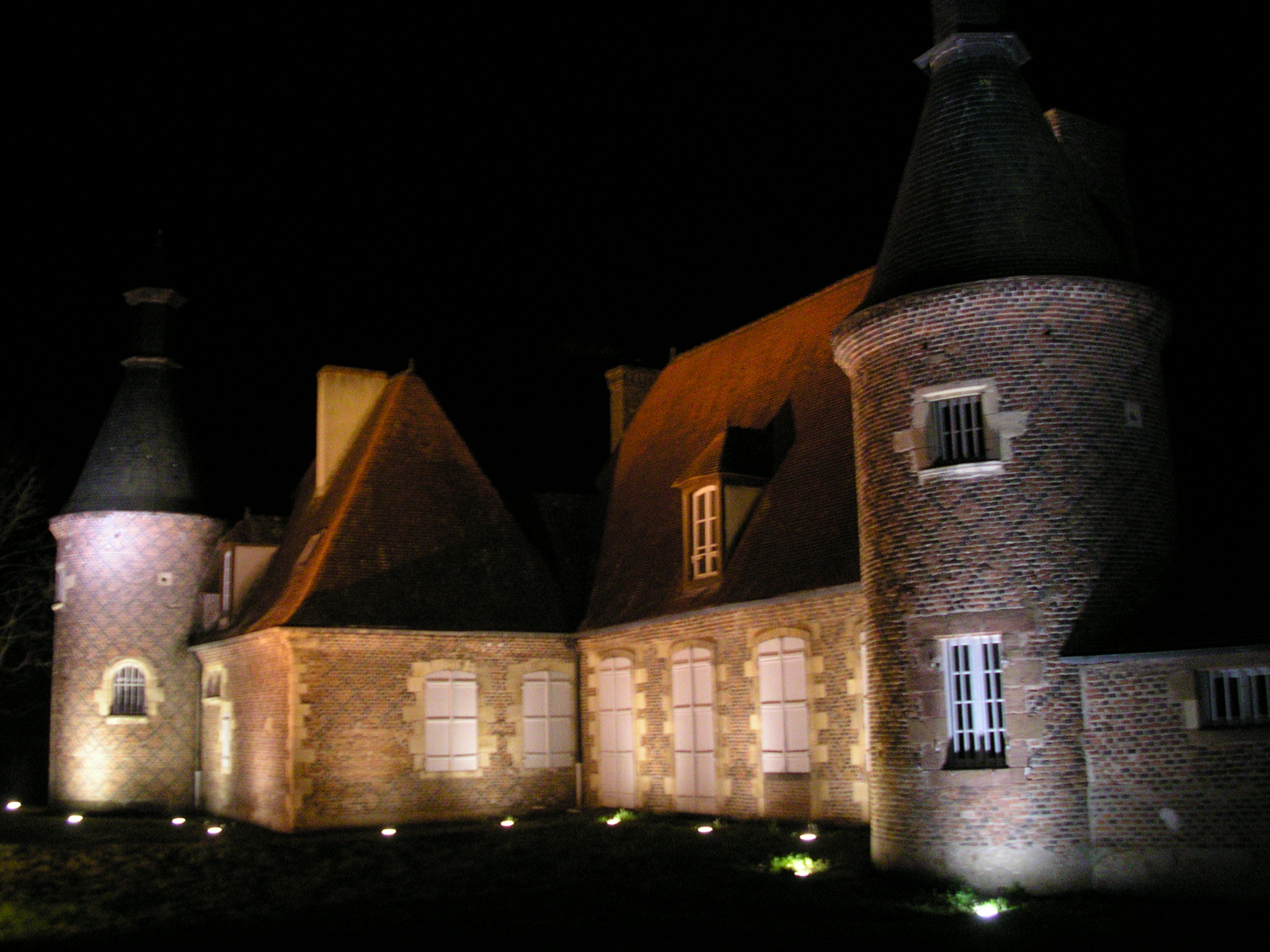 château de Panloup (YZEURE,FR03)